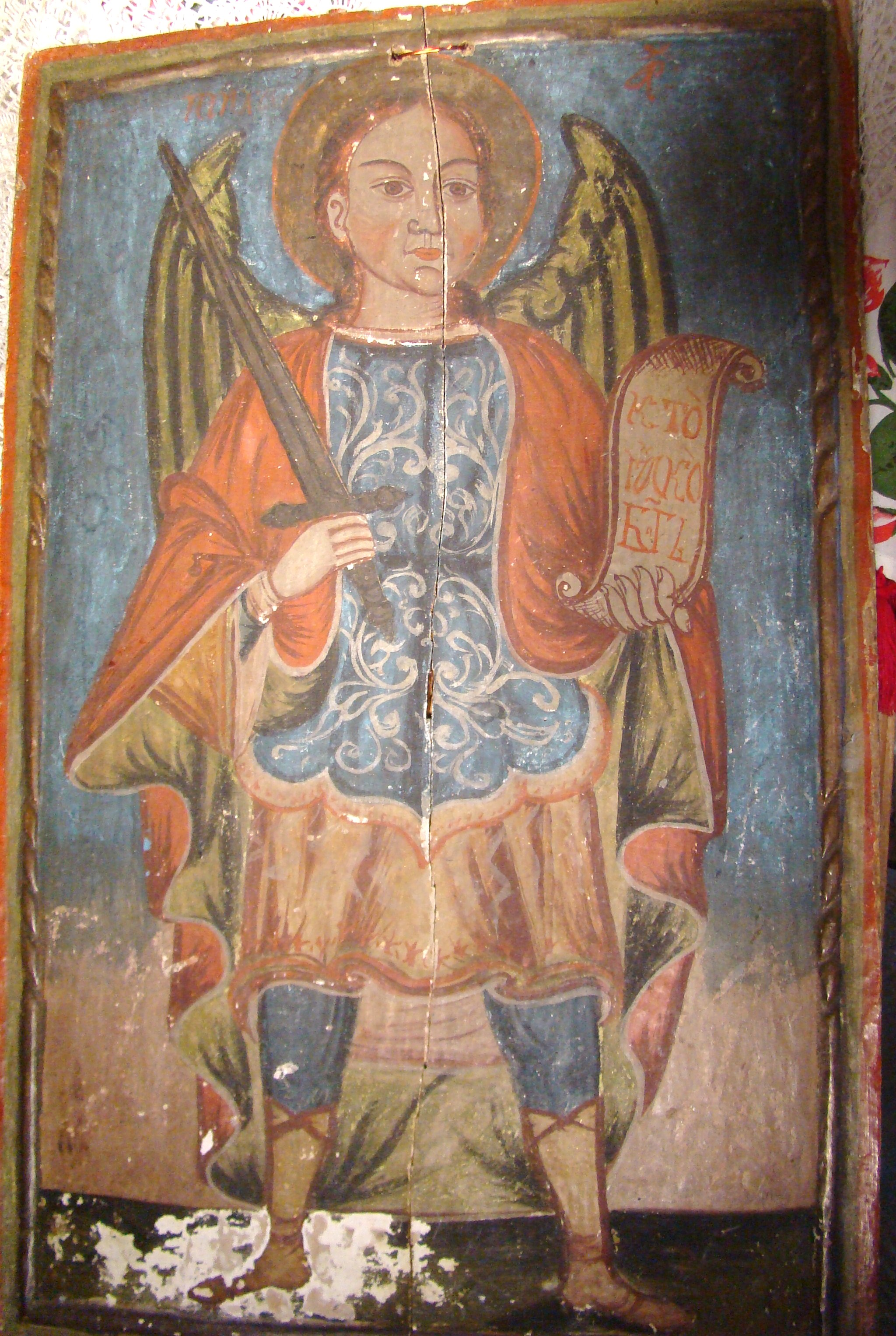 Biserica de lemn "Cuvioasa Paraschiva" , sat STEJERA; comuna MIREŞU MARE